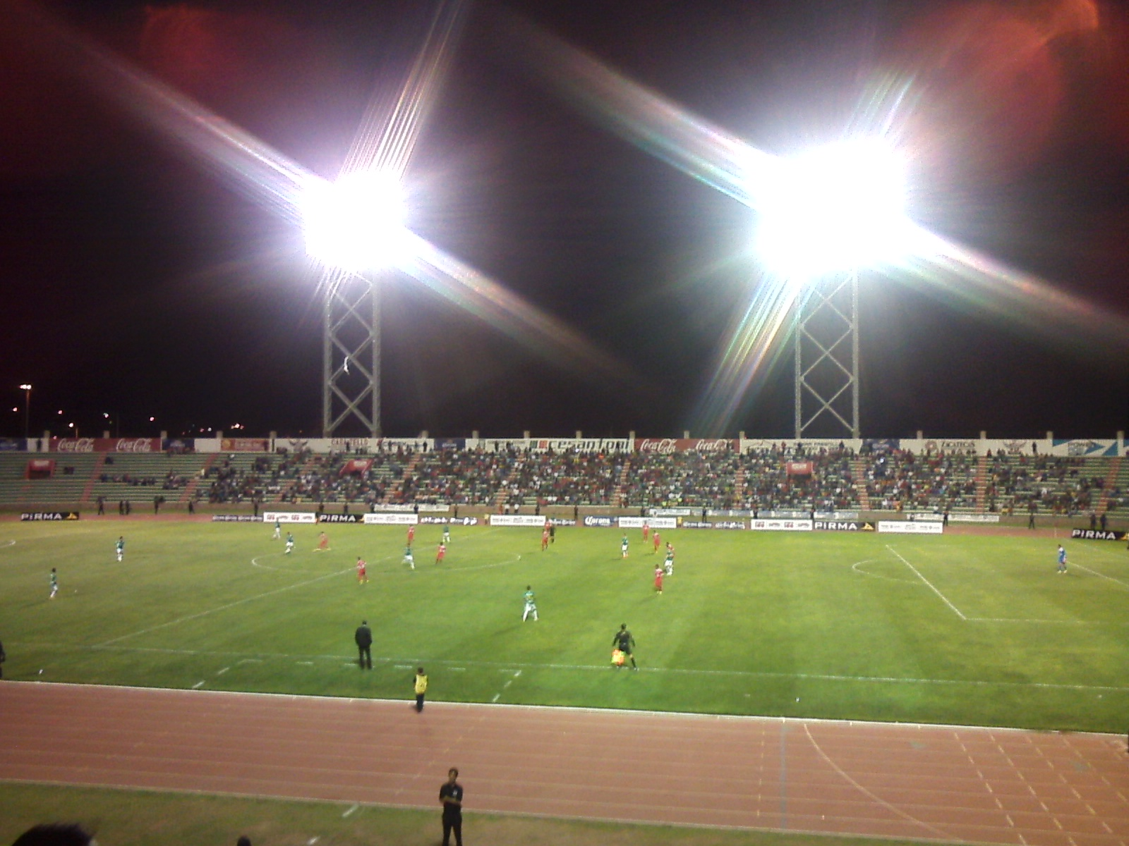 Estadio F. Villa de Zacatecas en un partido entre Mineros y León